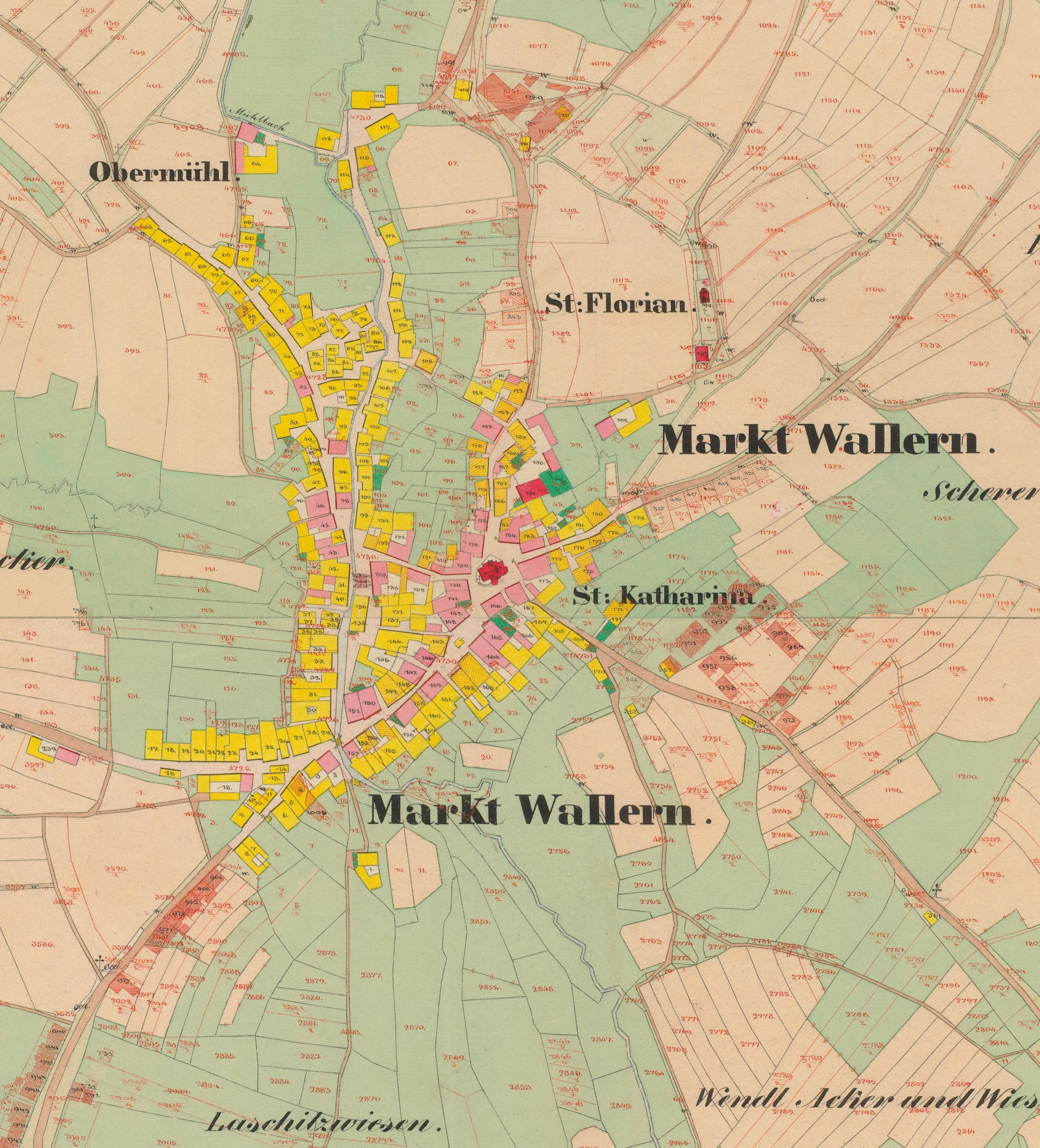 Volary na císařských otiscích mapy Stabilního katastru. Mapové listy 8752-1-013 a 8752-1-020, mapováno 1837.